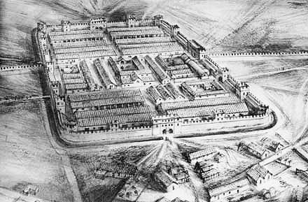 Viminacium camp légionnaire